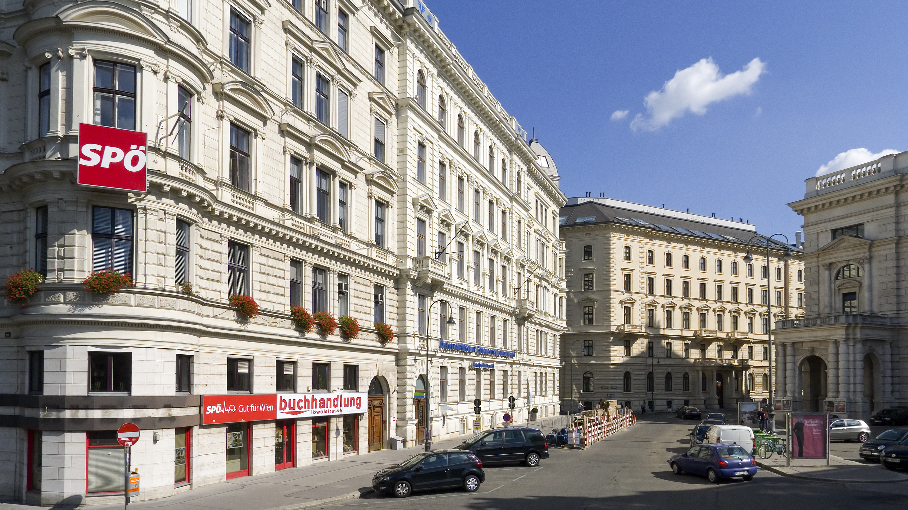 Löwelstraße in Wien 1 bei Nr. 20 Richtung Südosten